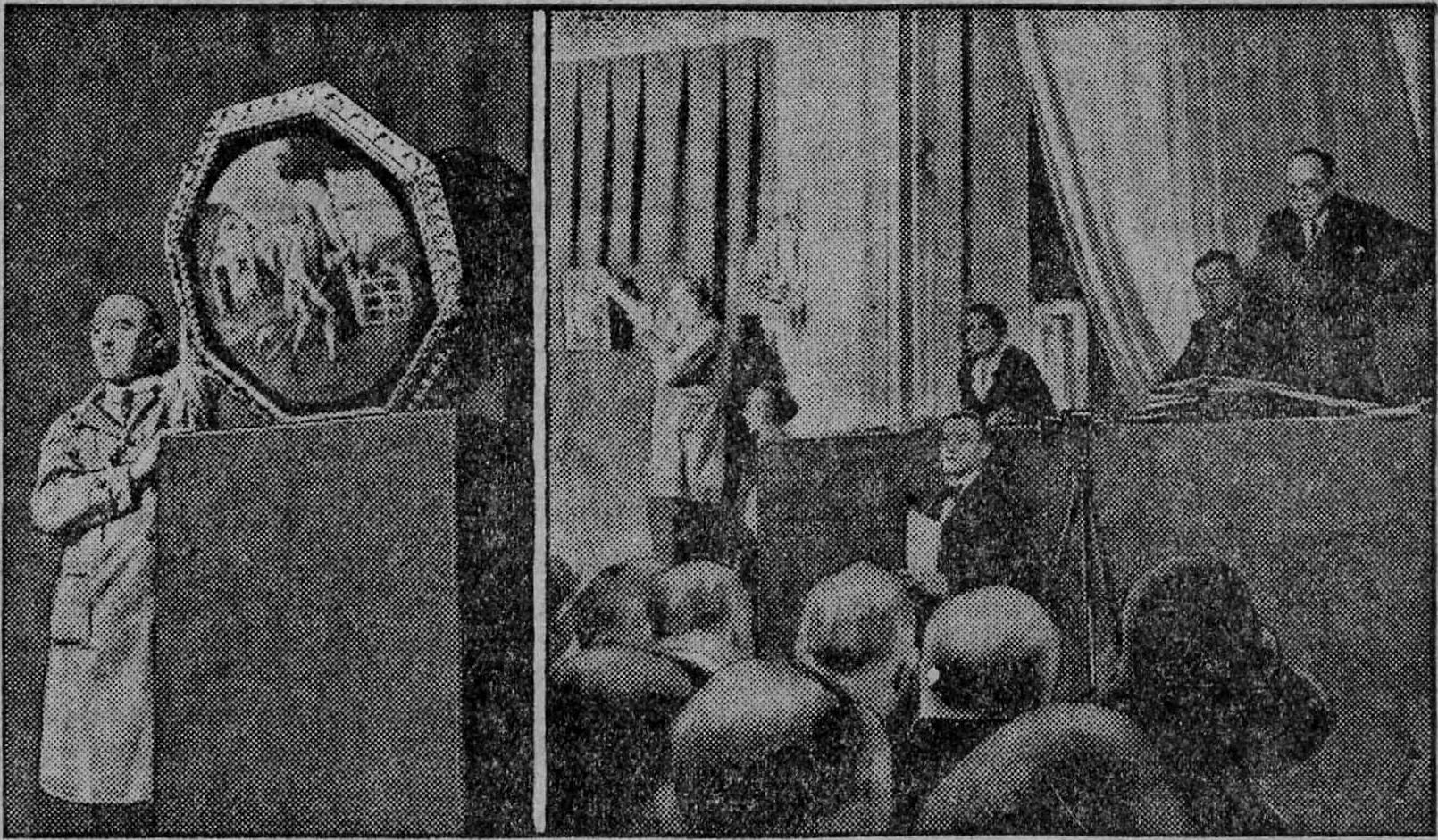 Veiling van de verzameling Figdor te Berlijn. Afkomstig uit de Nieuwe Tilburgsche Courant, 52e jaargang, nummer 10885 (woensdag 1 oktober 1930), Derde blad, [p. 4].